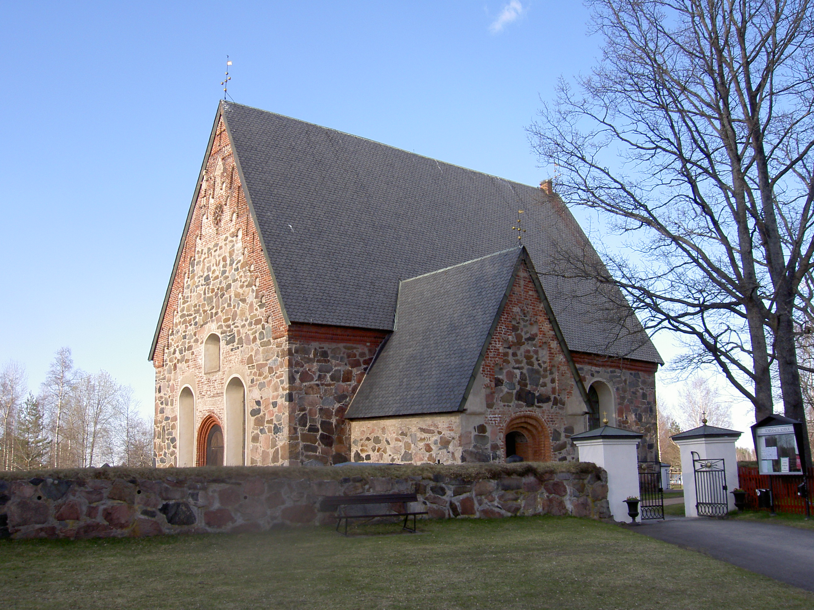 Torsångs kyrka